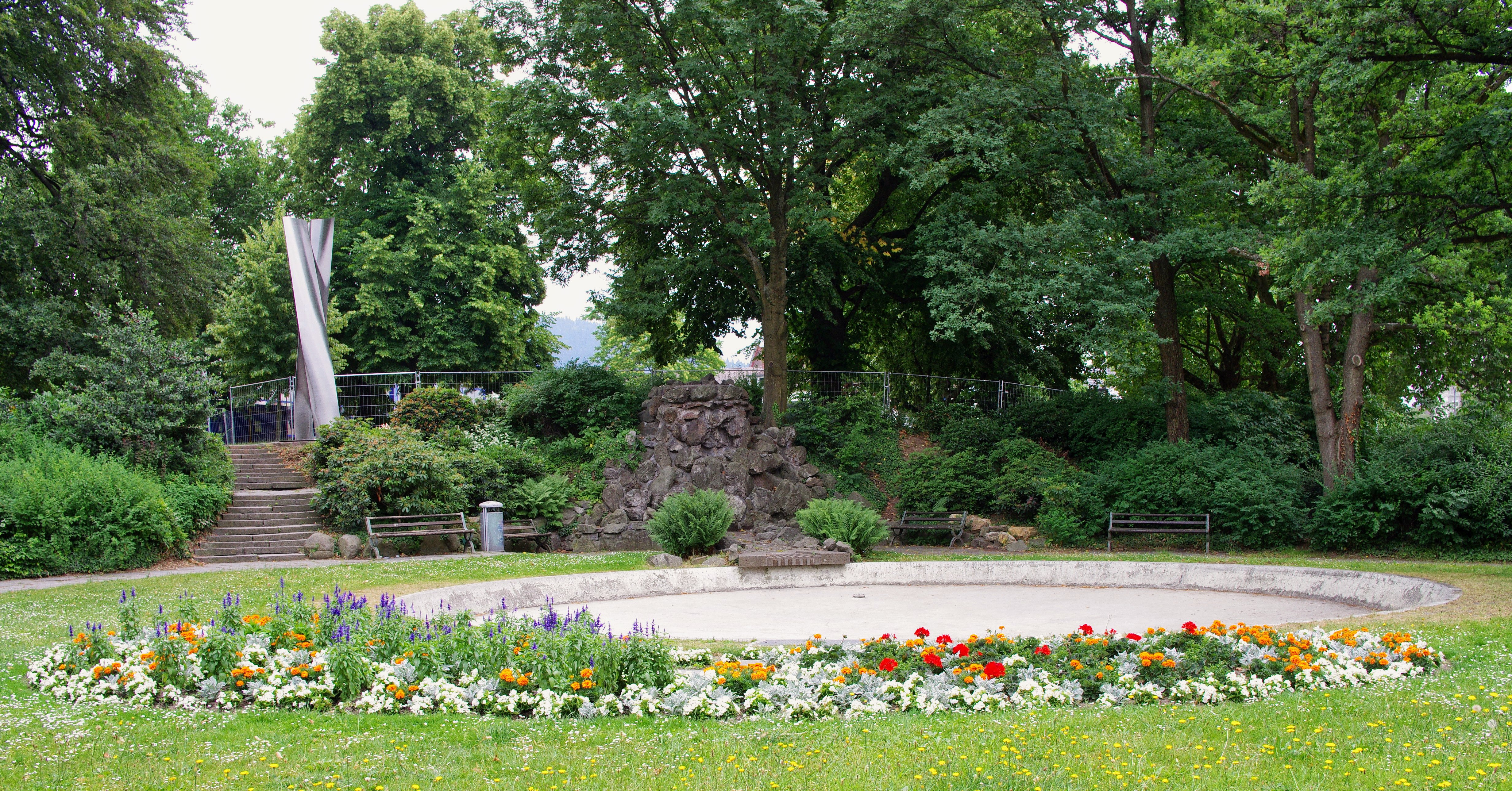 Steinhaufen am Alleegarten Rest eines Denkmals von Berthold Knittel